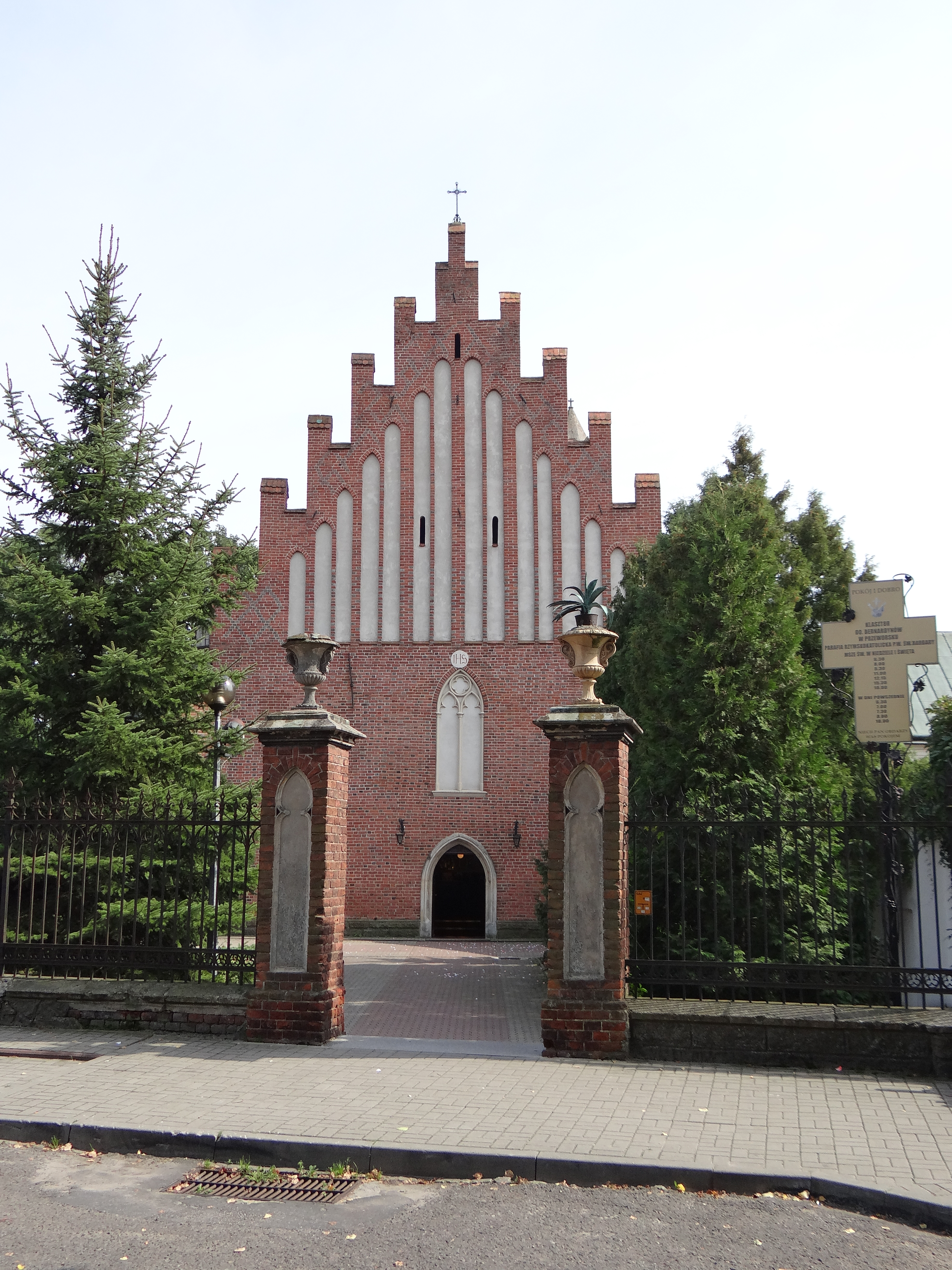 Przeworsk, kościół p.w. św. Barbary, 1461-1465, 1620-1647, 1757, 1902